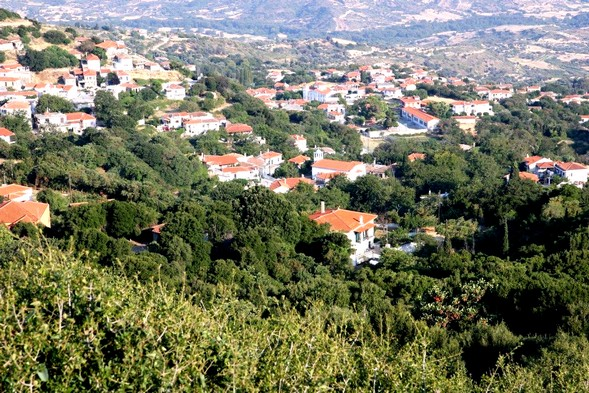 Οκτωνιά